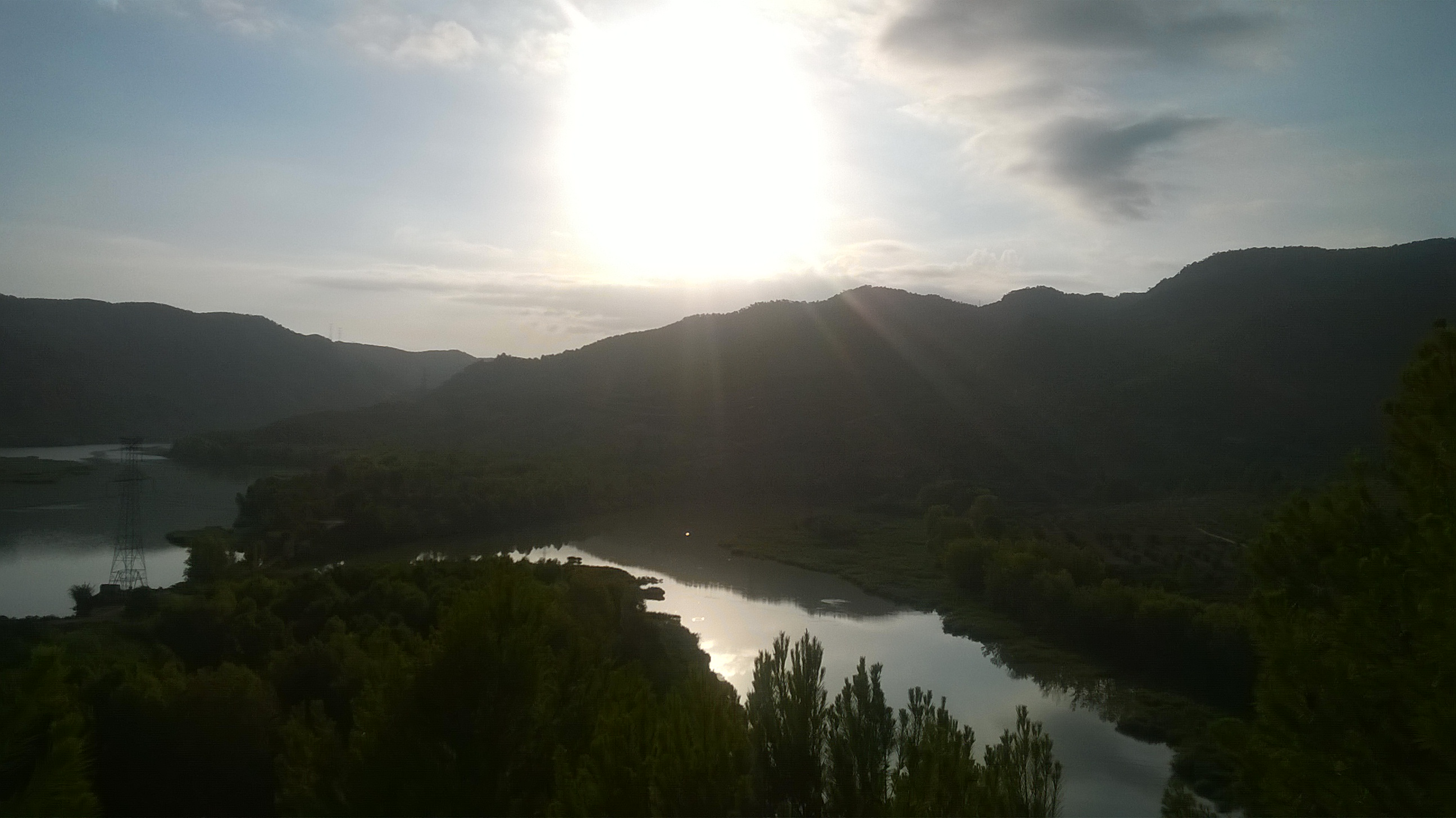 Vistas de Cofrentes tomadas durante el verano de 2014 por Isabel Valiente de la Granja.